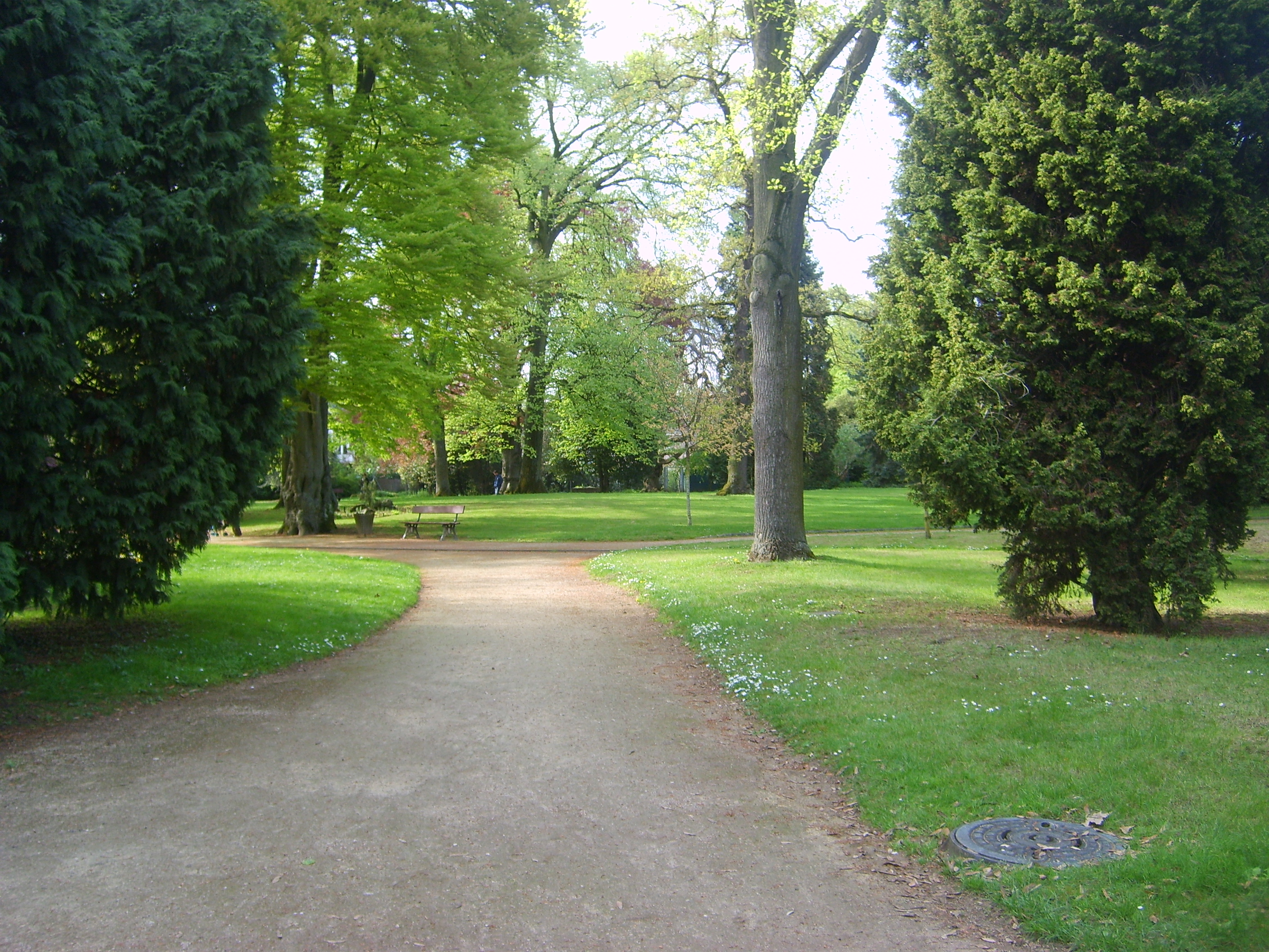 Détail du Jardin botanique de Metz